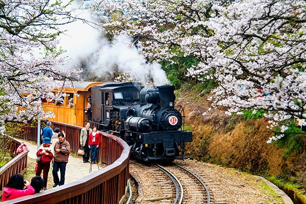 中文（台灣）: 阿里山櫻花蒸汽火車